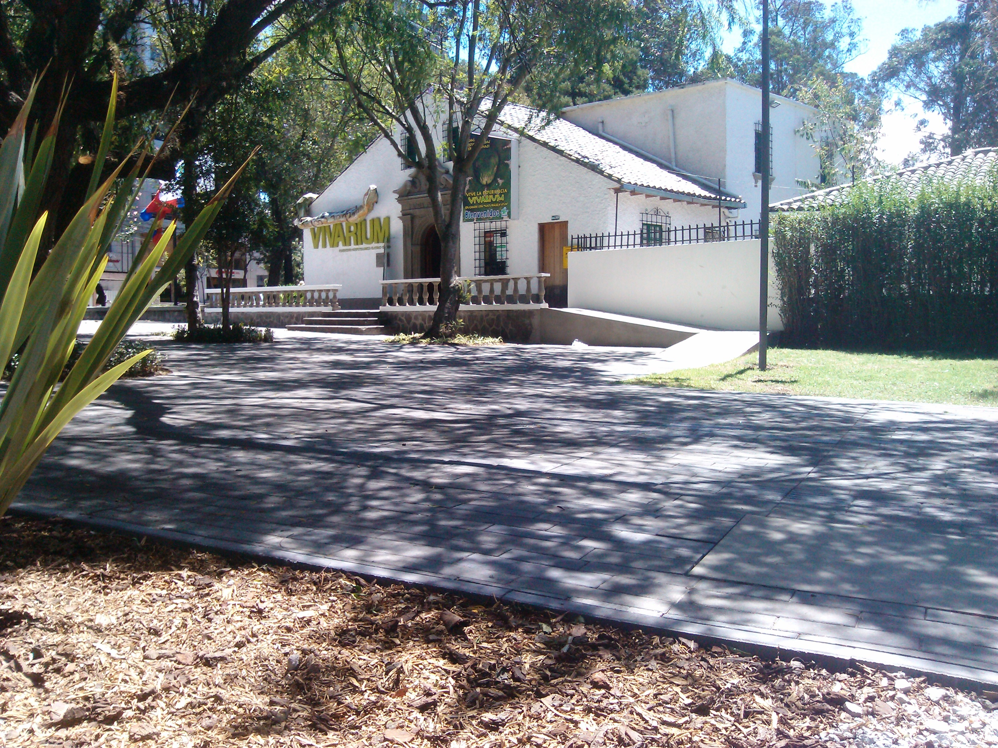 Vivarium (Parque La Carolina, Quito)